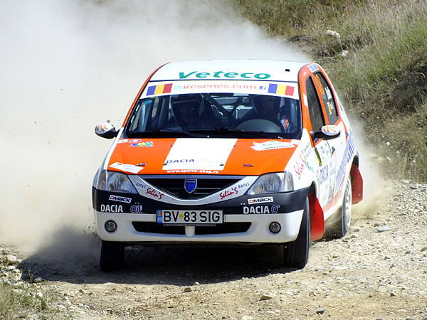 Echipajul Raul Badiu - Sergiu Itu (Dacia Logan), la editia 2012 a Raliului Sibiului, etapa a Intercontinental Rally Challenge. Foto: Romeo Tudorache @ rallyROM - Rail Media